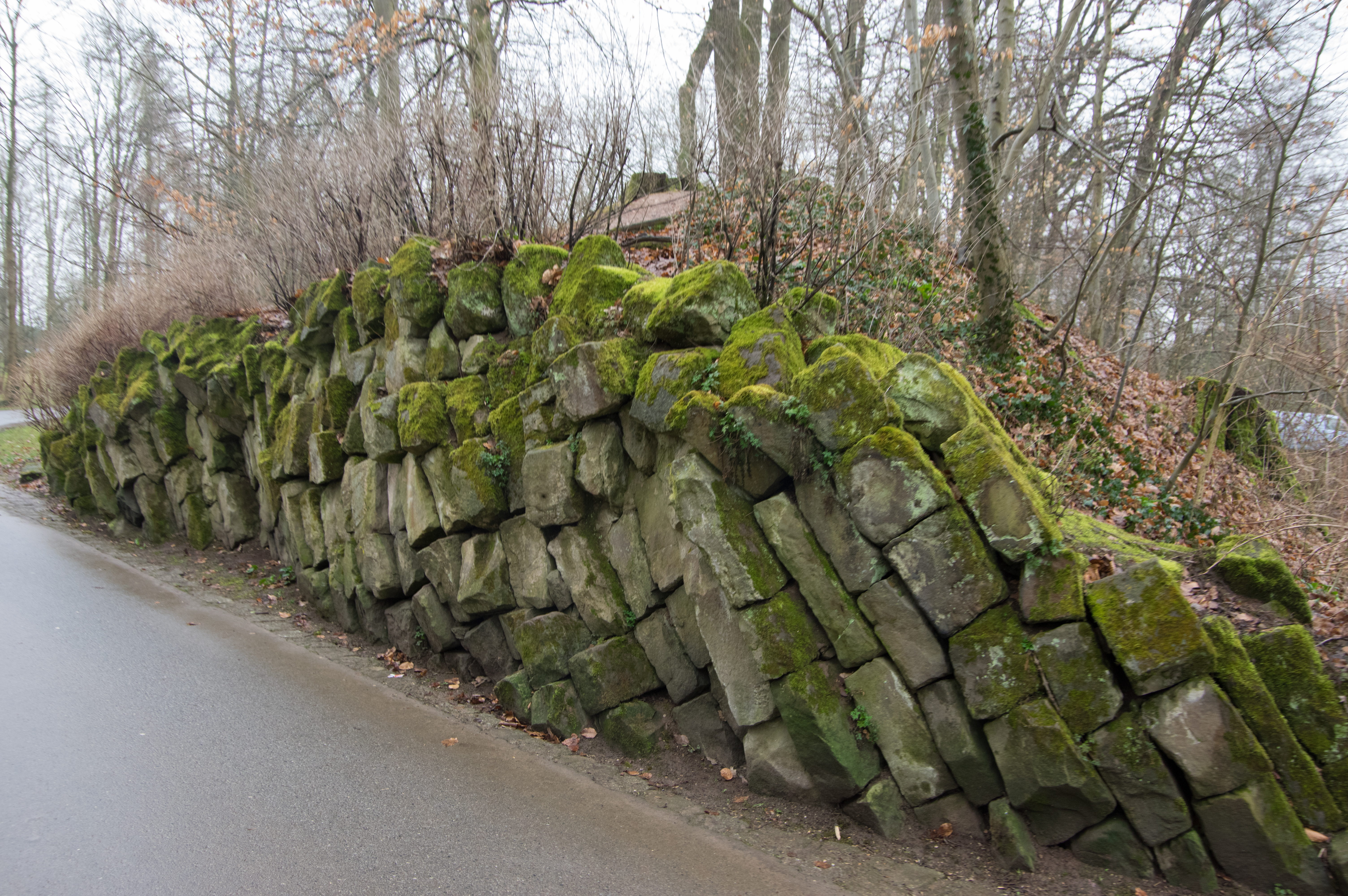 Pattensen in Niedersachsen. Der Wall befindet sich in der Nähe der Marienburg.